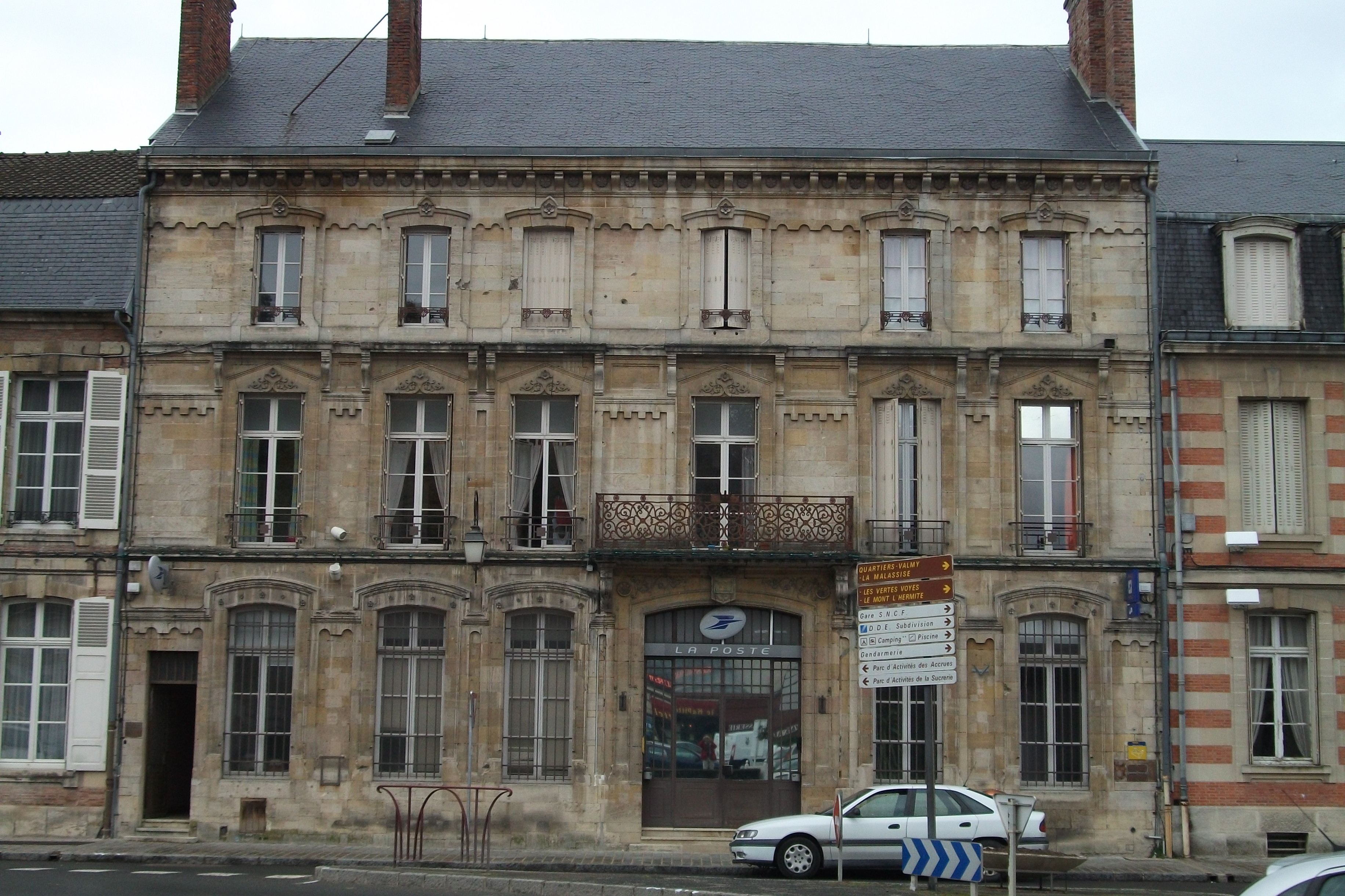 La Poste place du général Leclerc.